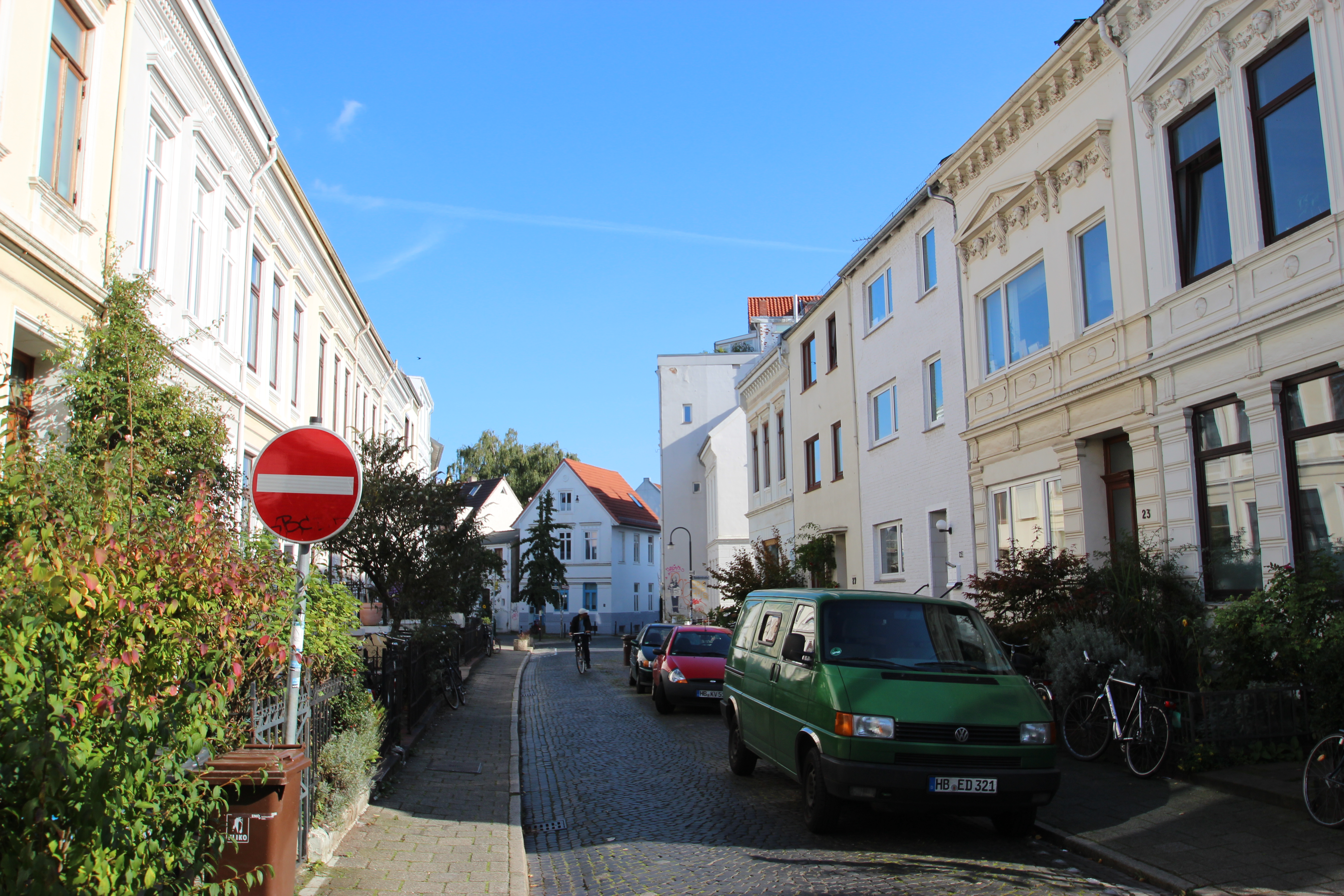 Ensemble Kreuzstraße in BremenDie Denkmalgruppe ist ein geschütztes Kulturdenkmal in der Freien Hansestadt Bremen, mit der Nr. 1424 beim Landesamt für Denkmalpflege registriert.